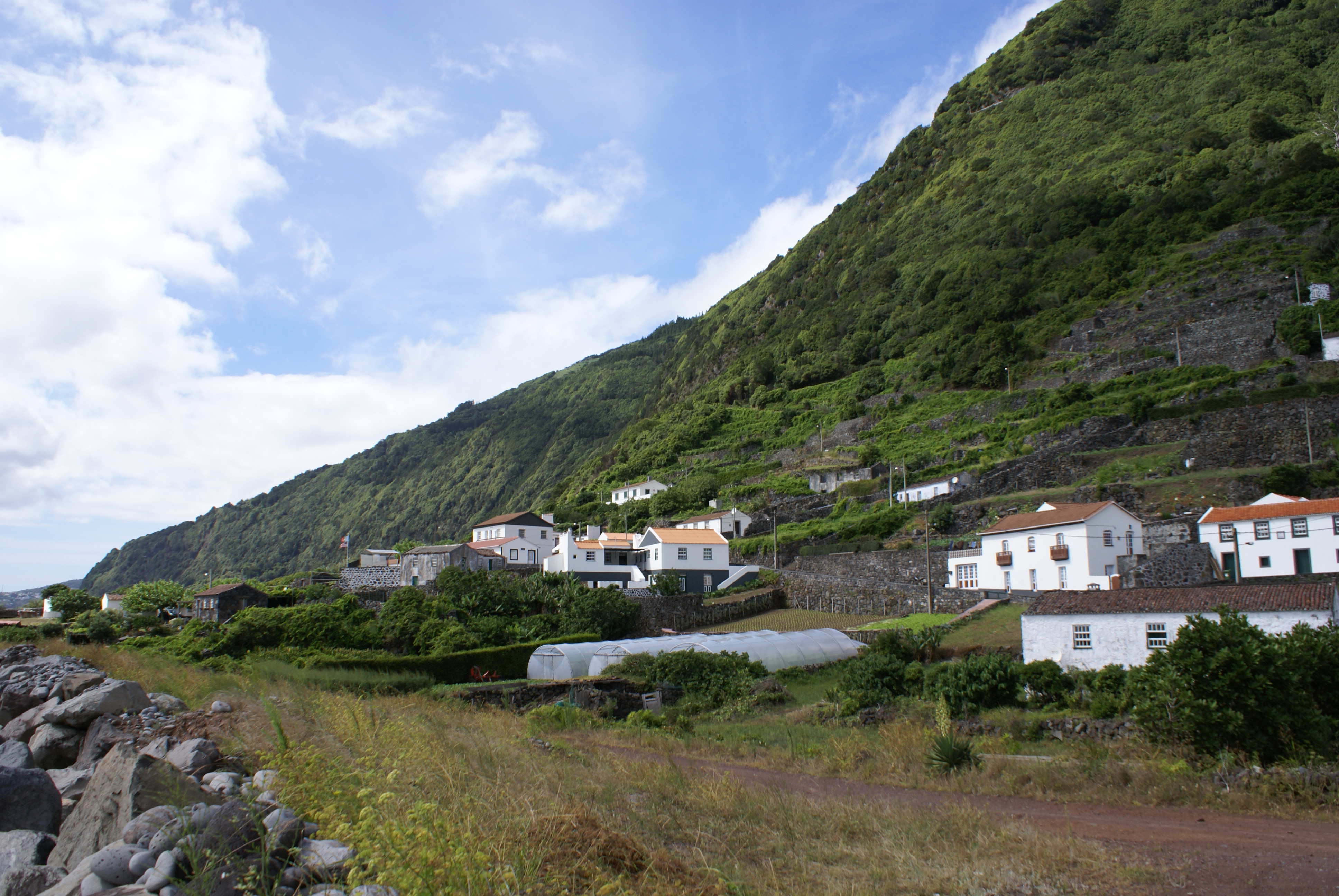 Faja dos Vimes, casario, Calheta, Açores, Portugal